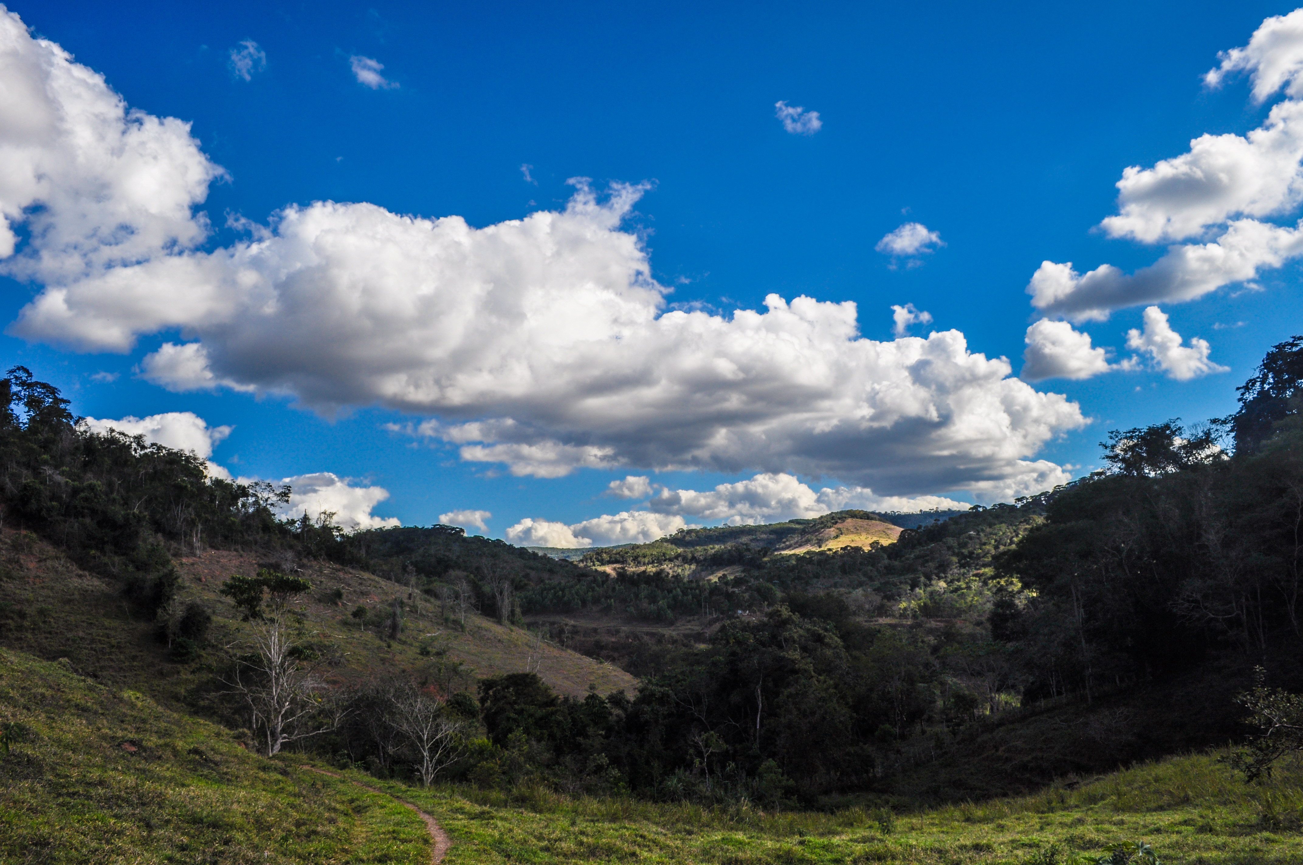 Foto tirada da área rural da cidade.